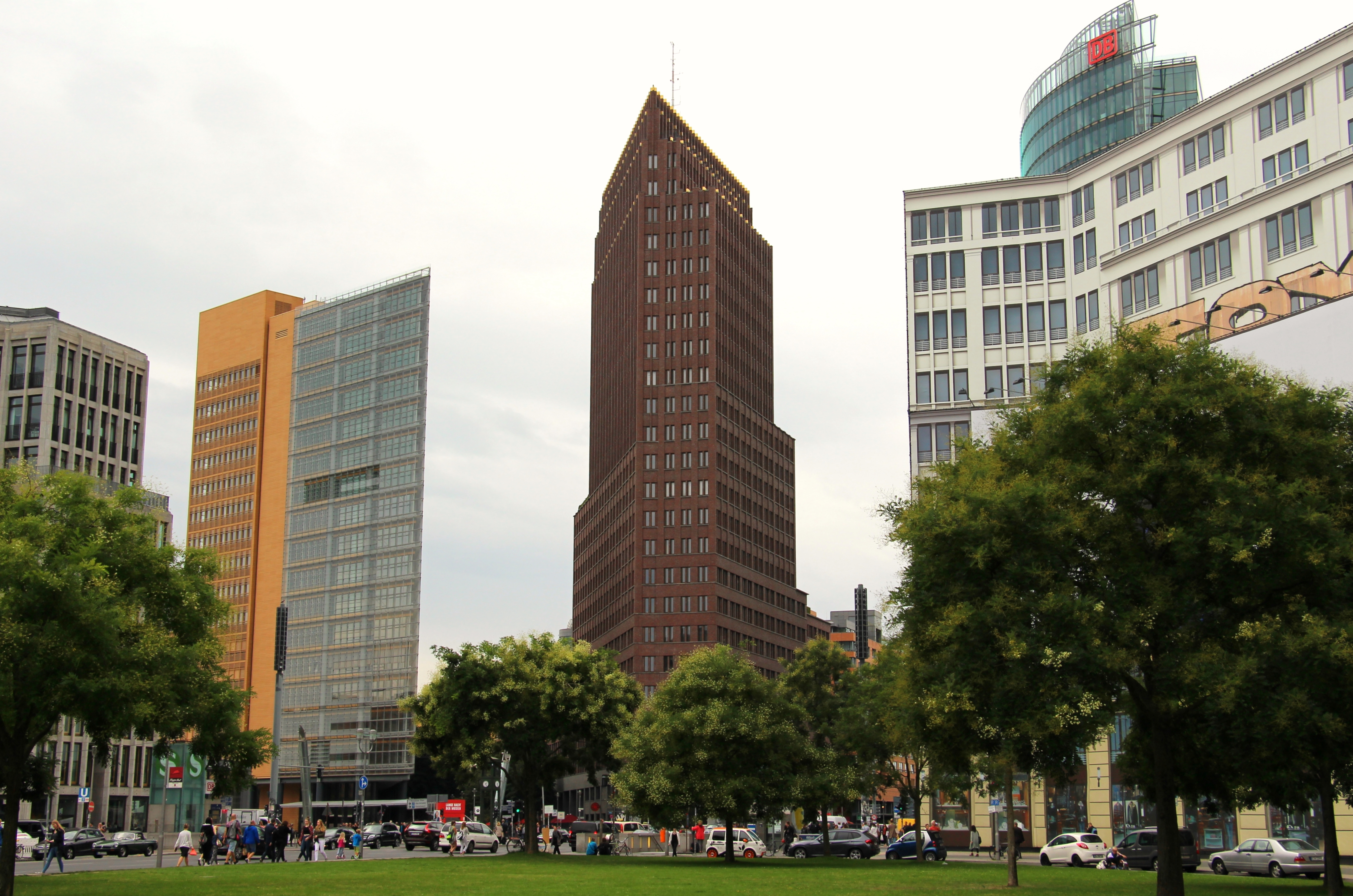 Tiergarten. Potsdamer Platz Potsdamer Platz 11 and Kollhoff-Tower from Leipziger Platz.